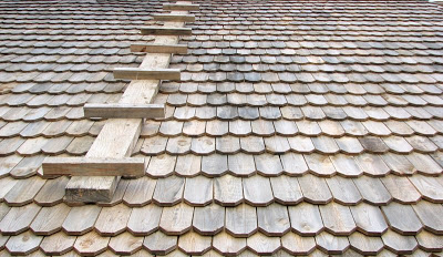 kimmkatus